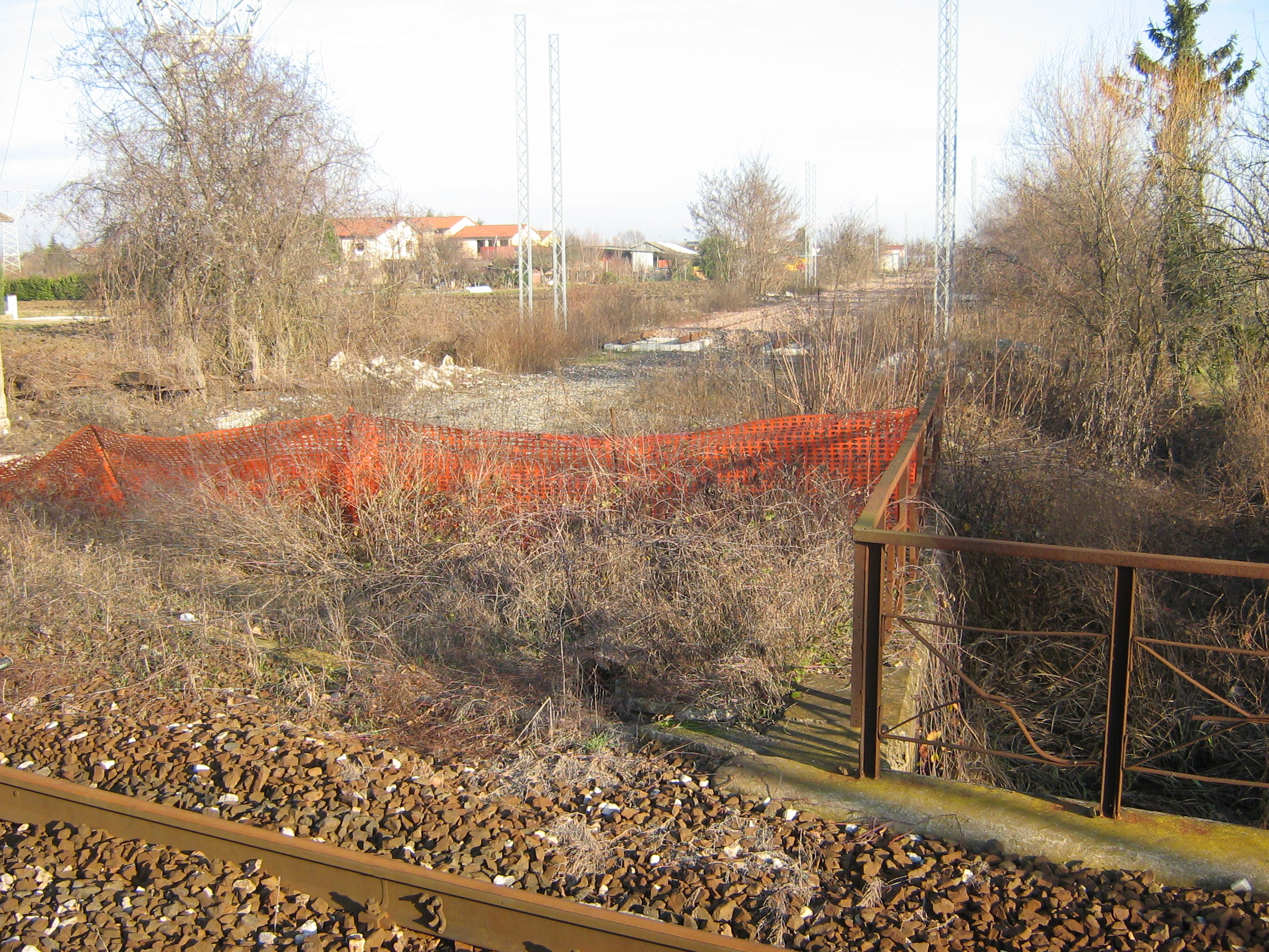 Asseggiano, l'ex incrocio fra la ferrovia Trento-Venezia (abbandonata, in primo piano) e la "linea dei bivi", abbandonata e disarmata.